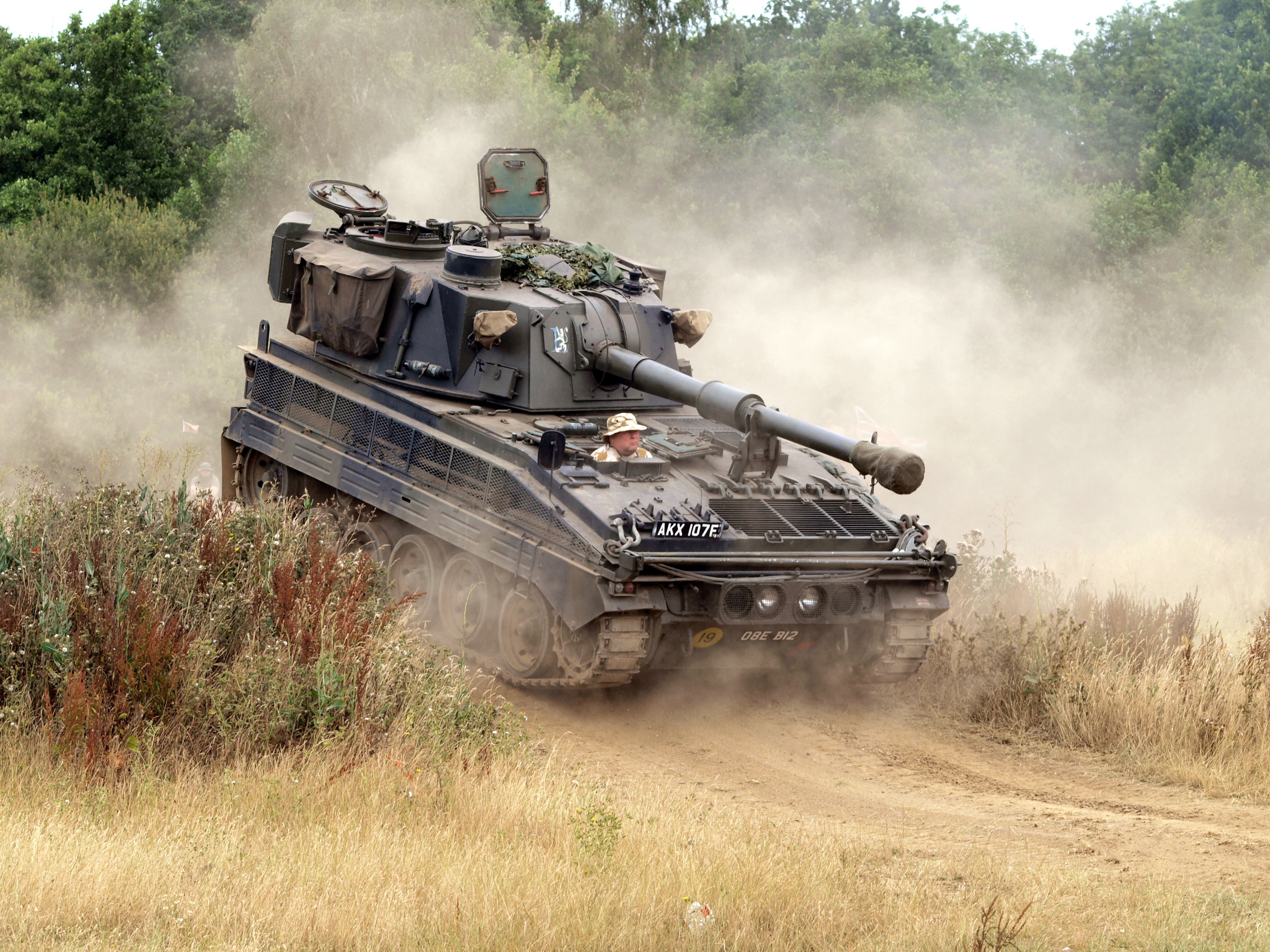 FV433 Abbot self-propelled 105mm gun